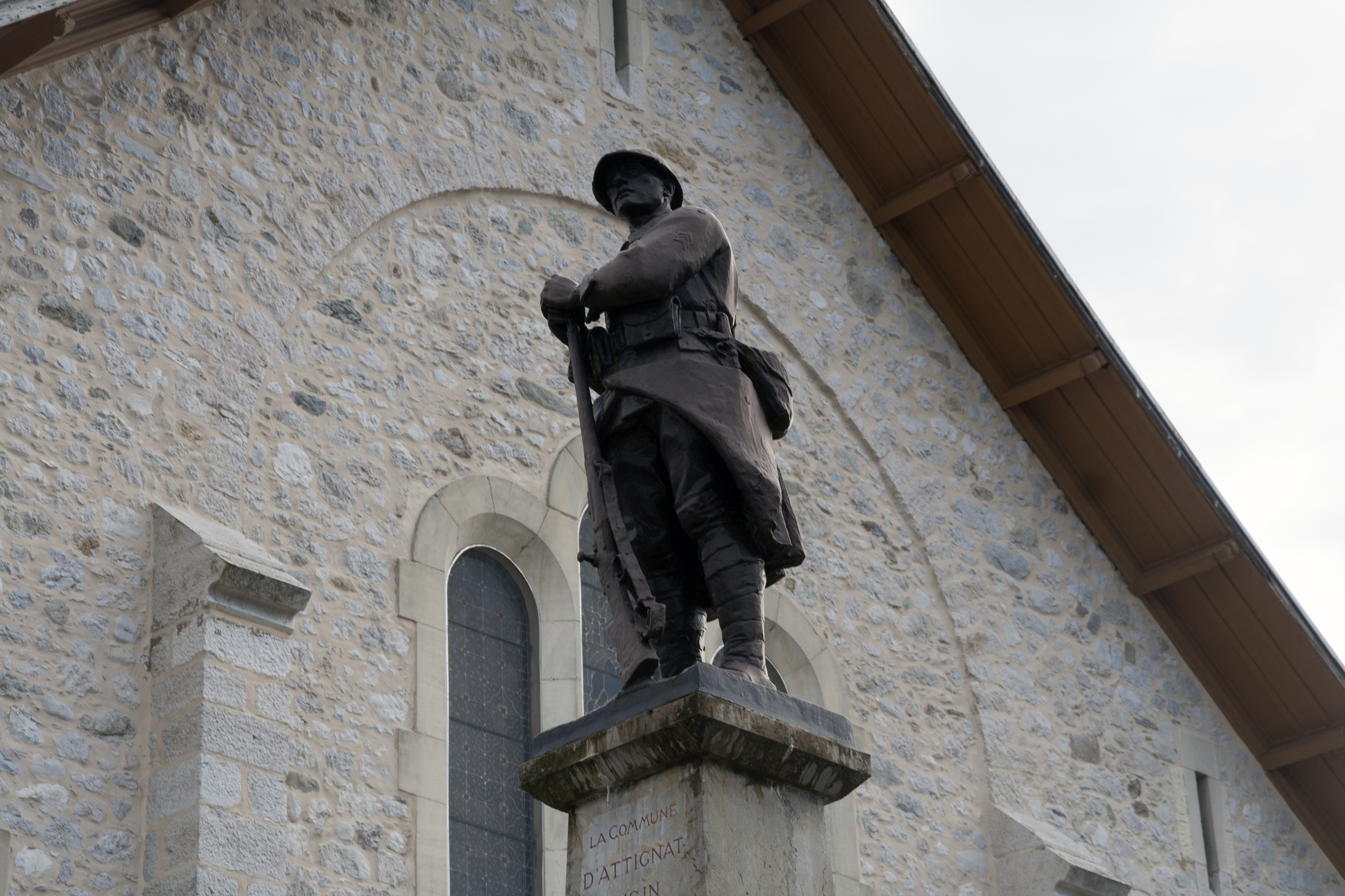 Attignat-Oncin (73610) : Le monument aux morts